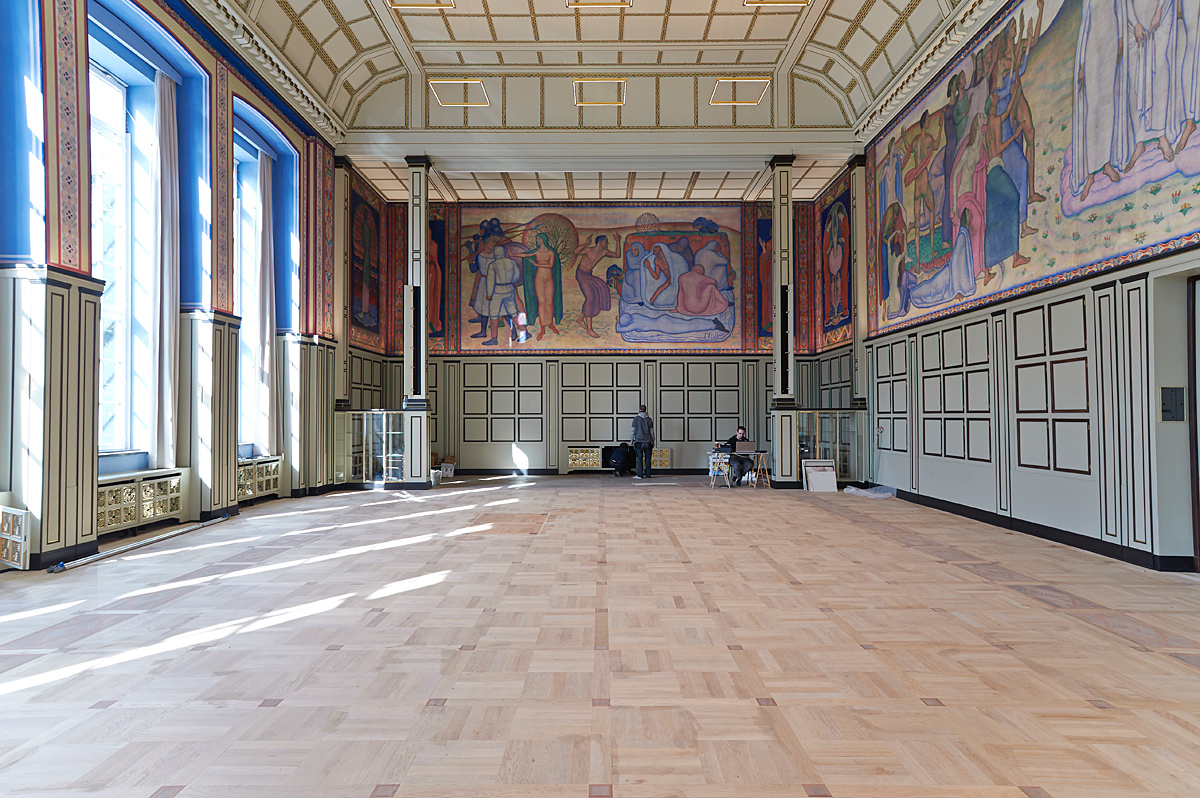 Aula der Hochschule für bildende Künste Hamburg mit dem restaurierten Wandbild "Die ewige Welle" von Willy von Beckerath (1868-1938)